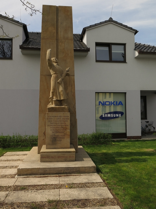 Pomník padlým volyňským Čechům (Uničov), křižovatka ulic Střední a Husova, Uničov, Uničov.